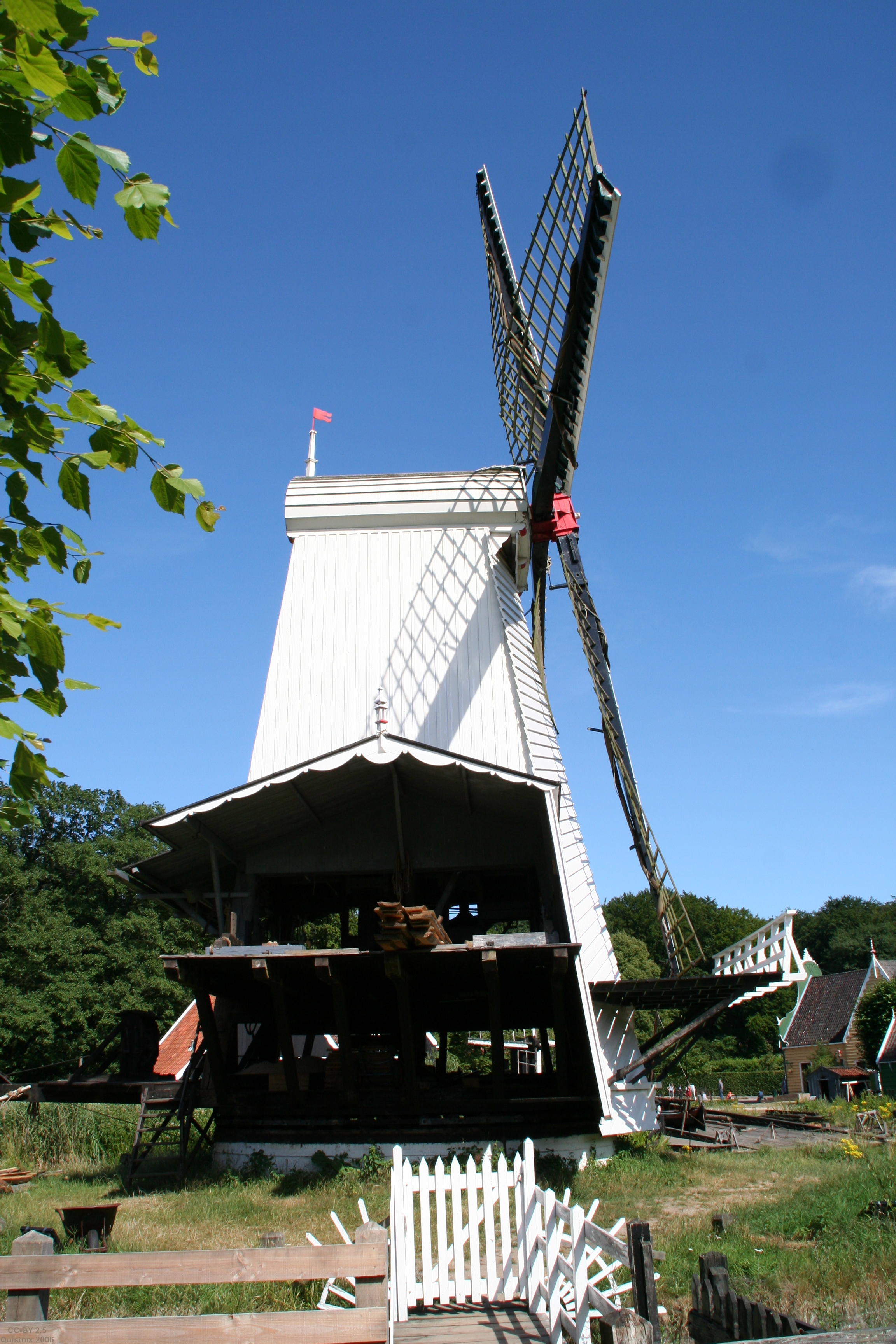 Paltrokmolen in het Nederlands Openluchtmuseum te Arnhem. Zijaanzicht. Eigen werk. Patrokmolen in Openluchtmuseum, Arnhem